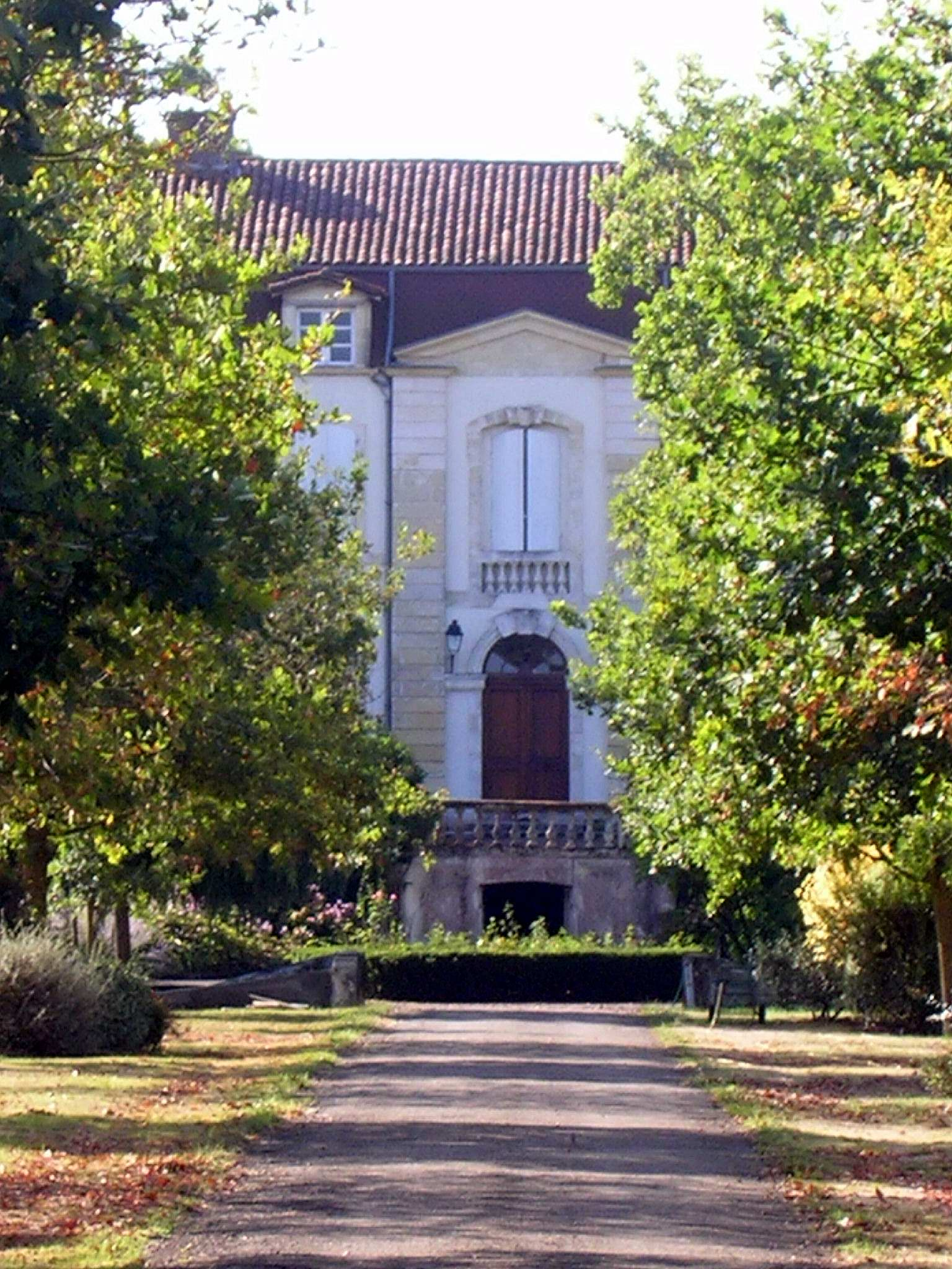 Le château de Saint-Maurice, sur la commune de Saint-Maurice-sur-Adour, dans le département français des Landes